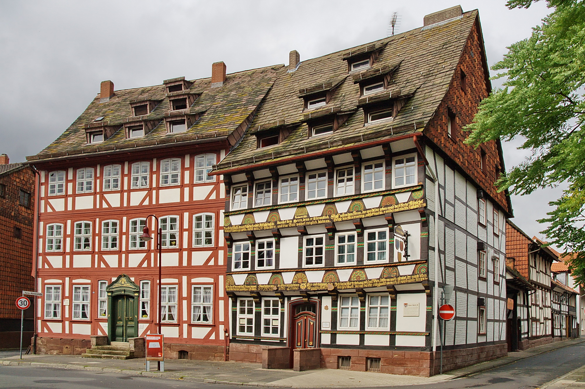 Bürgerhäuser des Rokoko (links) und der Renaissance (rechts) in Einbeck, Niedersachsen, Deutschland